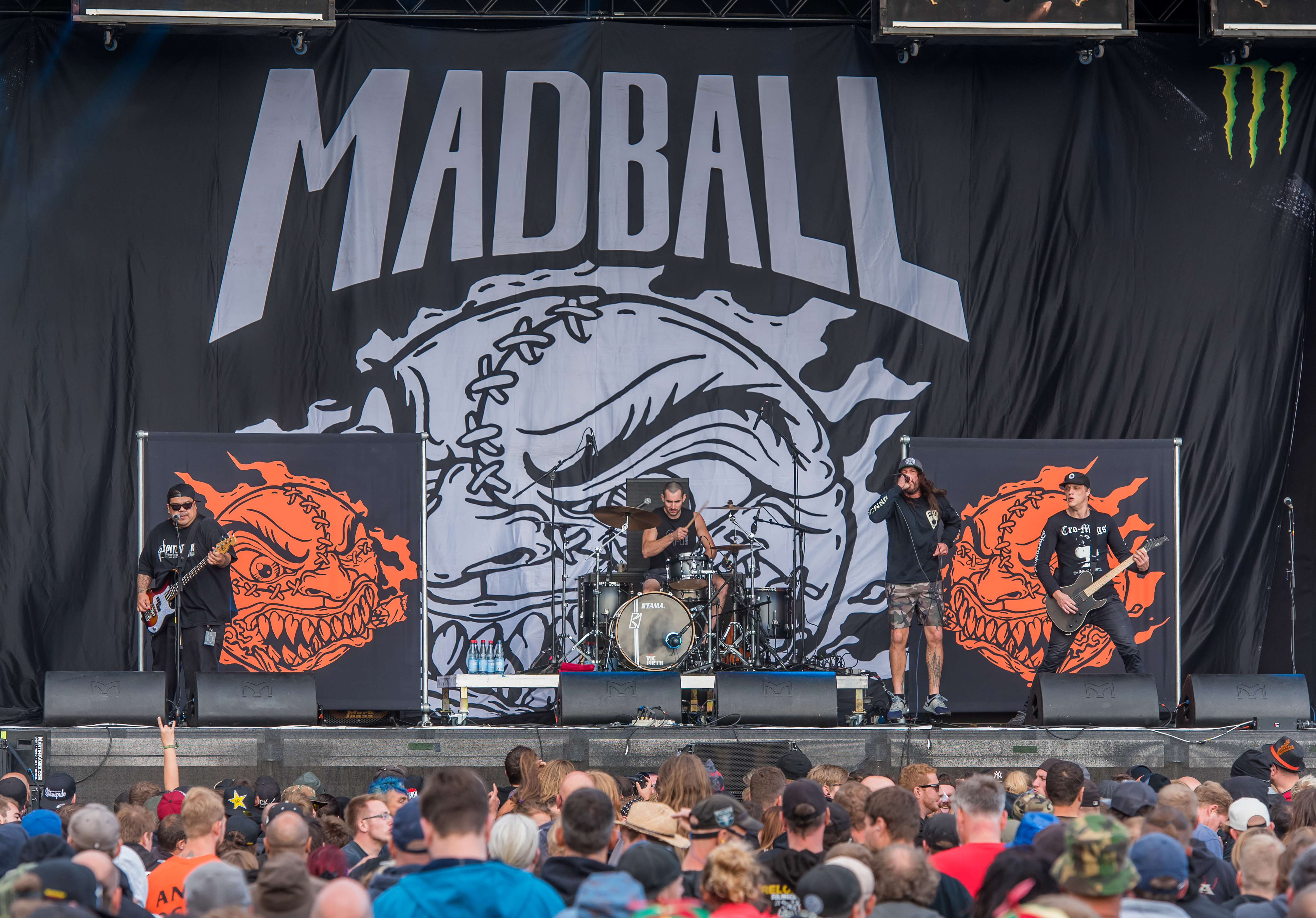 Madball auf dem Reload Festival 2018